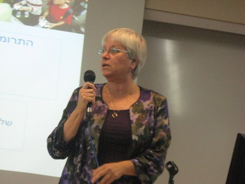 דיקן הקולג' לתקשורת המונים באוניברסיטת SIU - Southern Illinois University, Carbondale, חוקרת תקשורת בתחומים: ילדים, נוער ותרבות פנאי וכן דימויי נשים וגברים בתקשורת והבניית זהות מגדרית; באמצעי מדיה כגון, טלוויזיה, רדיו ומדיה דיגיטלית